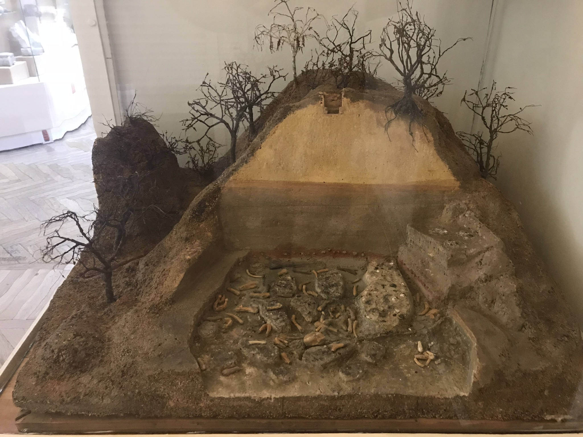 Макет Кирилловской стоянки, кон. XIX в. Национальный музей истории Украины, Киев. Макет был изготовлен по заказу Викентия Хвойко к XI-у Всероссийскому археологическому съезду, который состоялся в Киеве в 1899 г. Внизу изображены раскопки стоянки охотников на мамонтов, вверху — разведывательный шурф, в котором Викентий Хвойка впервые исследовал памятники трипольской культуры